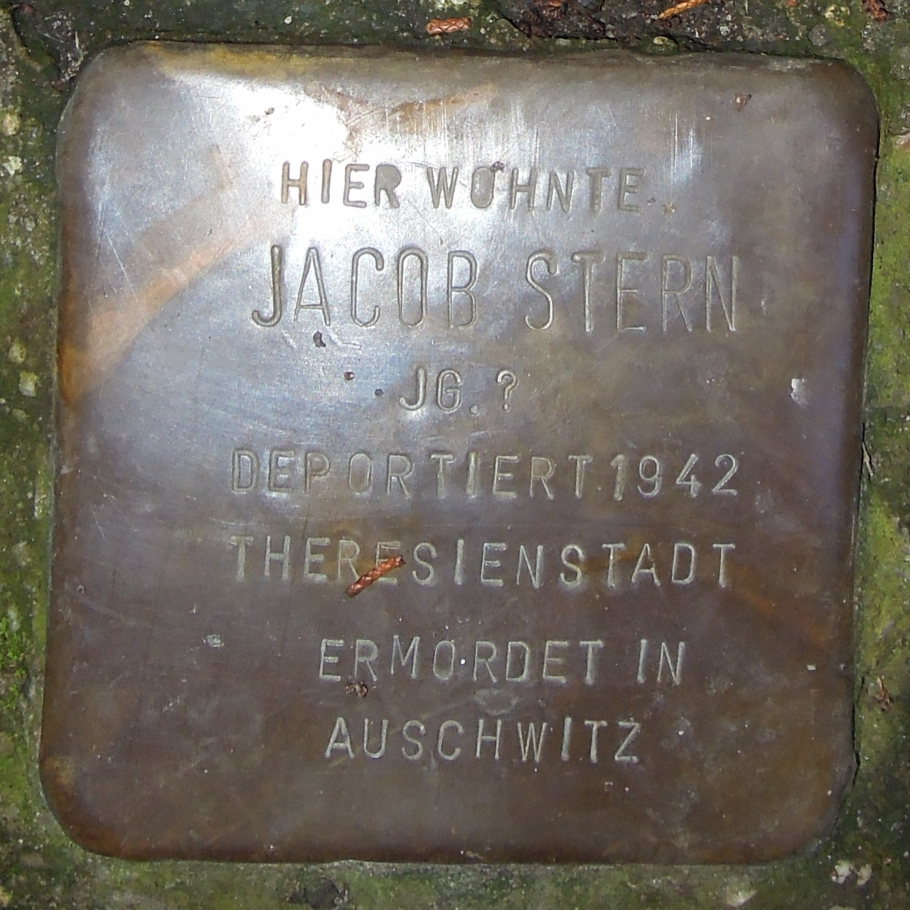 Stolperstein in Soest Georgsgasse 4, Jacob Stern